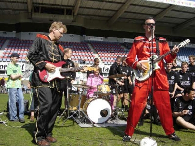 Hail Gewoon in het Stadion Oosterpark van FC Groningen . Dit was bij de opname van hun videoclip : Euroborg voor TV Noord . Deze foto is gemaakt door mezelf ik ben Poppla roadie van Hail Gewoon